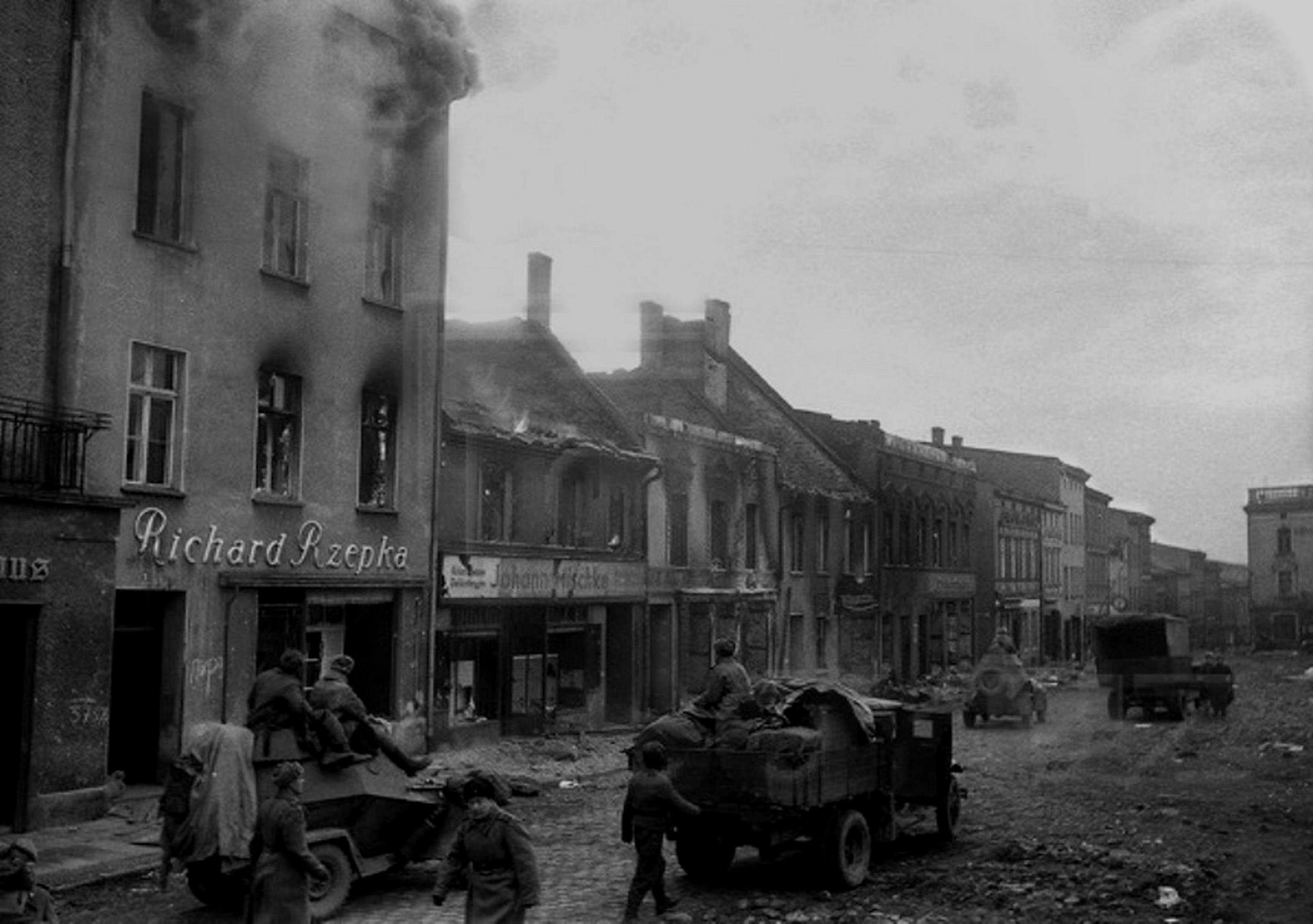 Zajęcie Białej przez Armię Czerwoną 1945